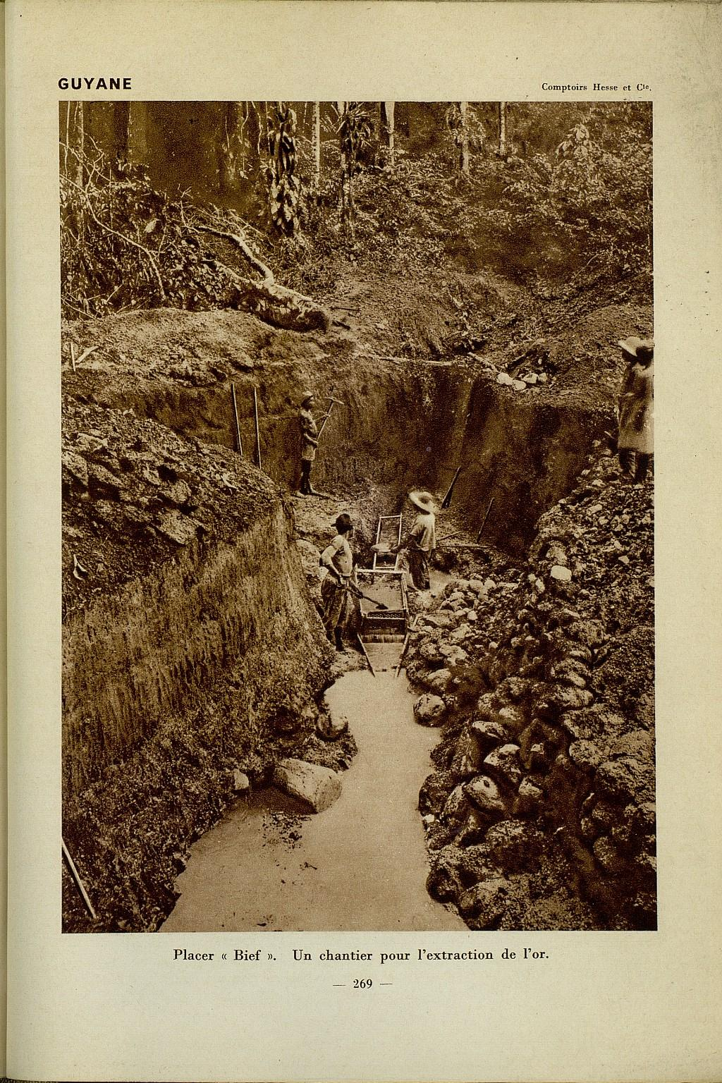 Guyane. Placer Bief . Un chantier pour l'extraction de l'or